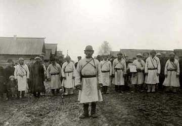 Mari (volk), een kart